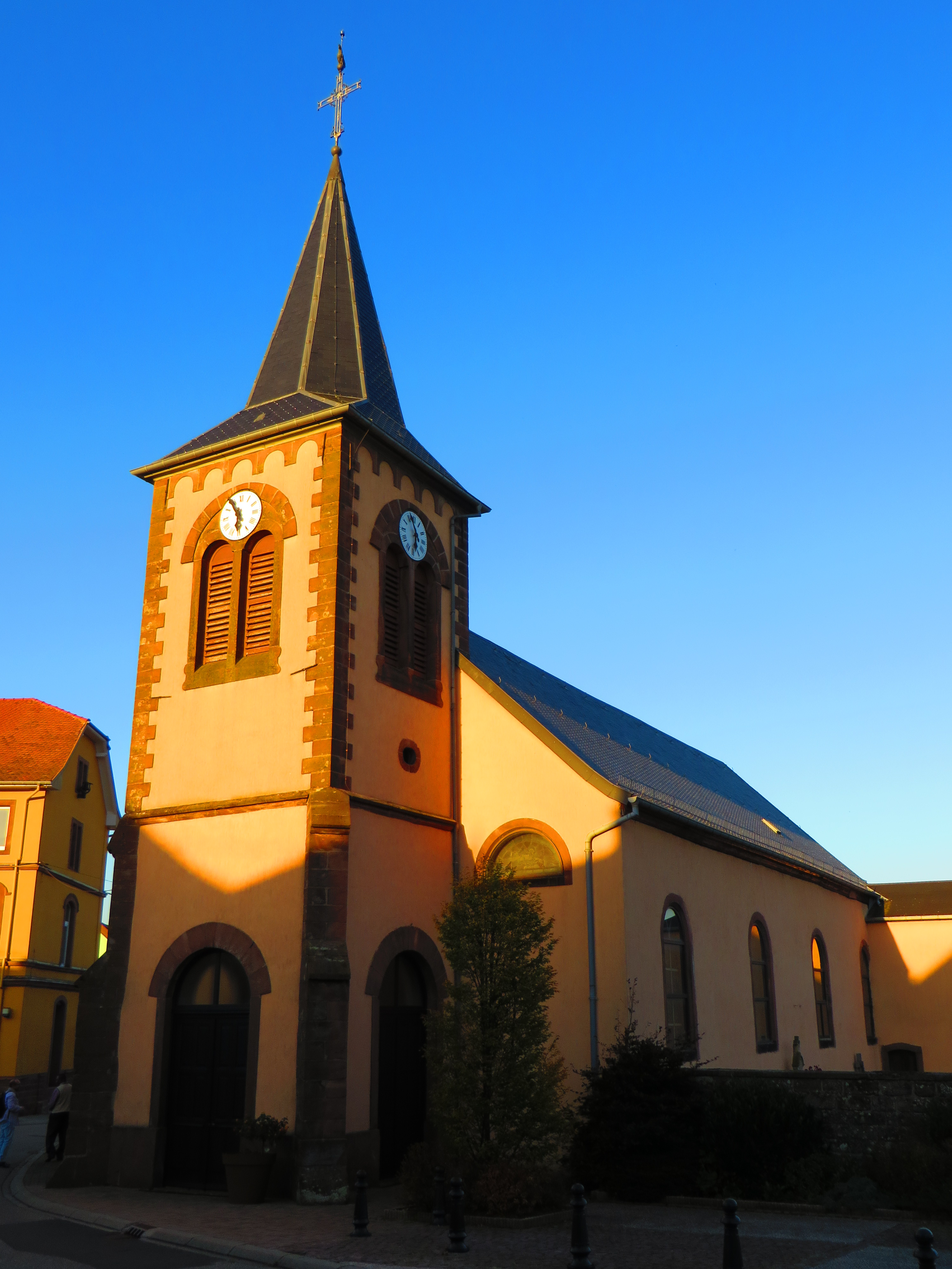 Garrebourg Église Saint-Coloman